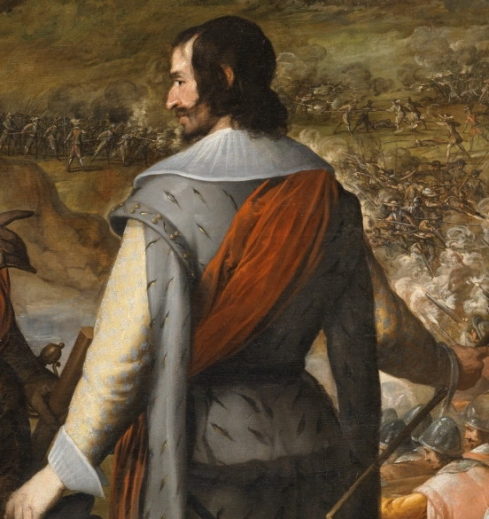 Capitán Juan de Amézqueta. Detalle del cuadro que representa la recuperación de la Isla de Puerto Rico en 1625 por las tropas españolas a las órdenes de Juan de Haro y Sanvítores.